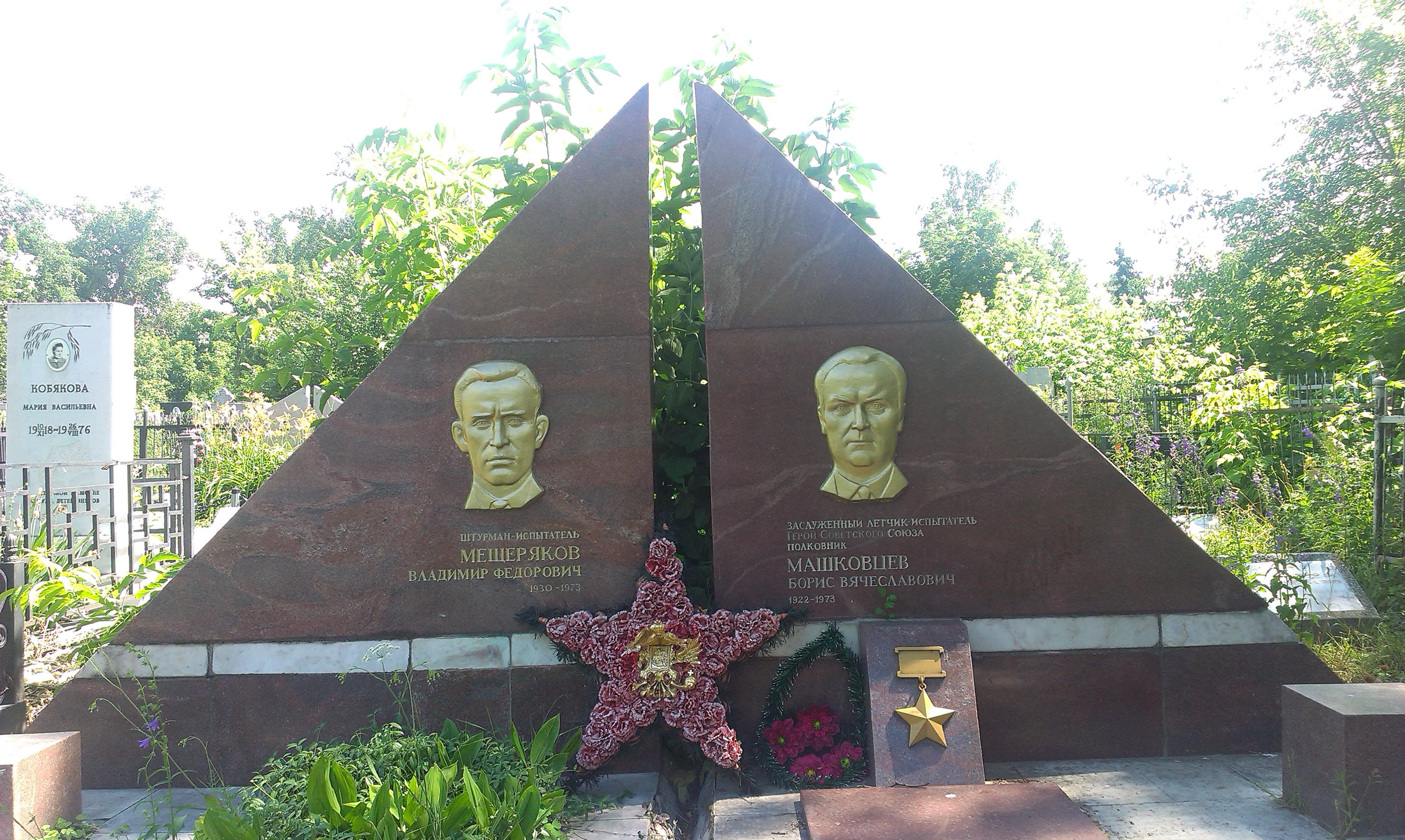 Арское кладбище